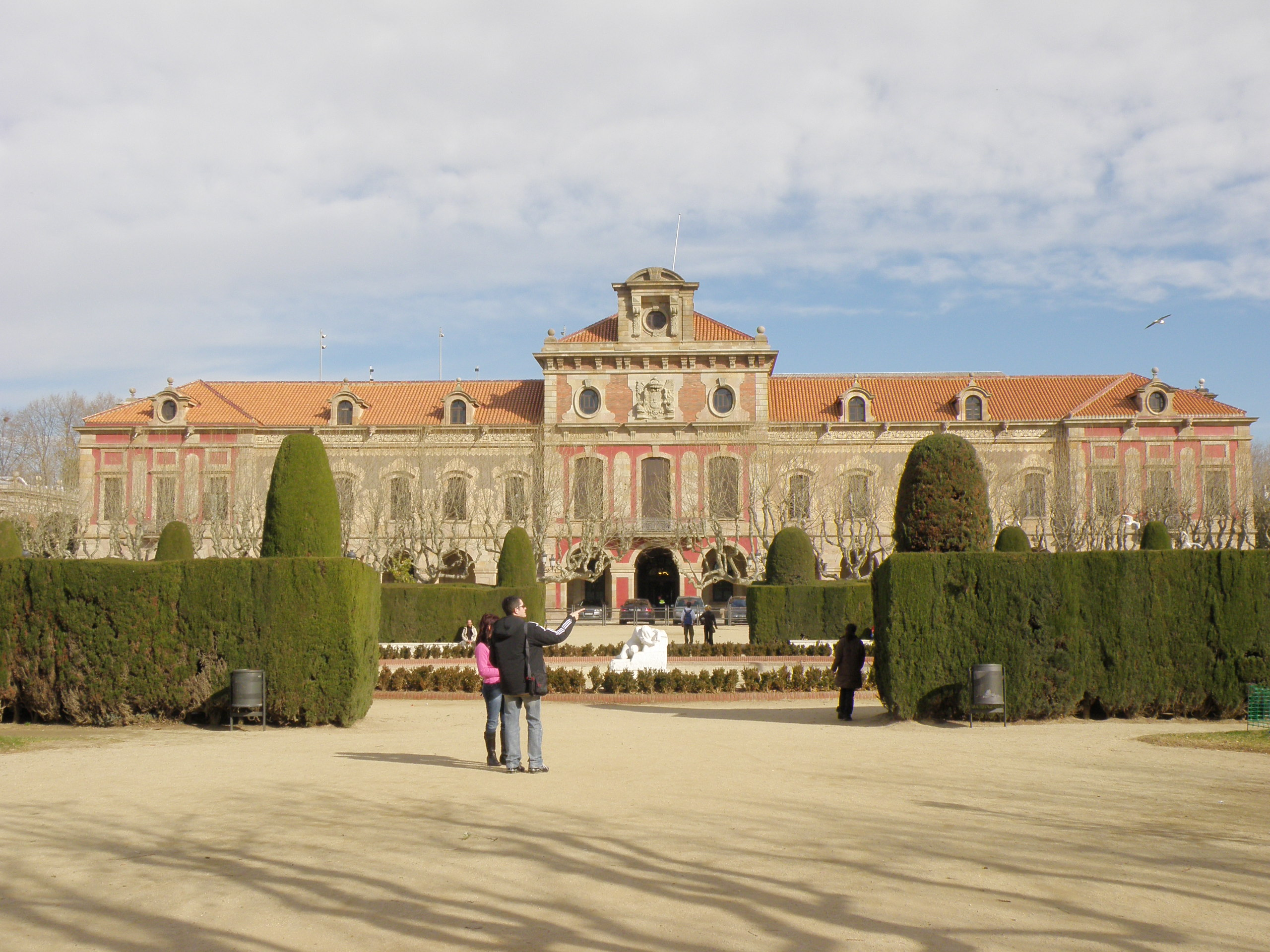 parque de barcelona